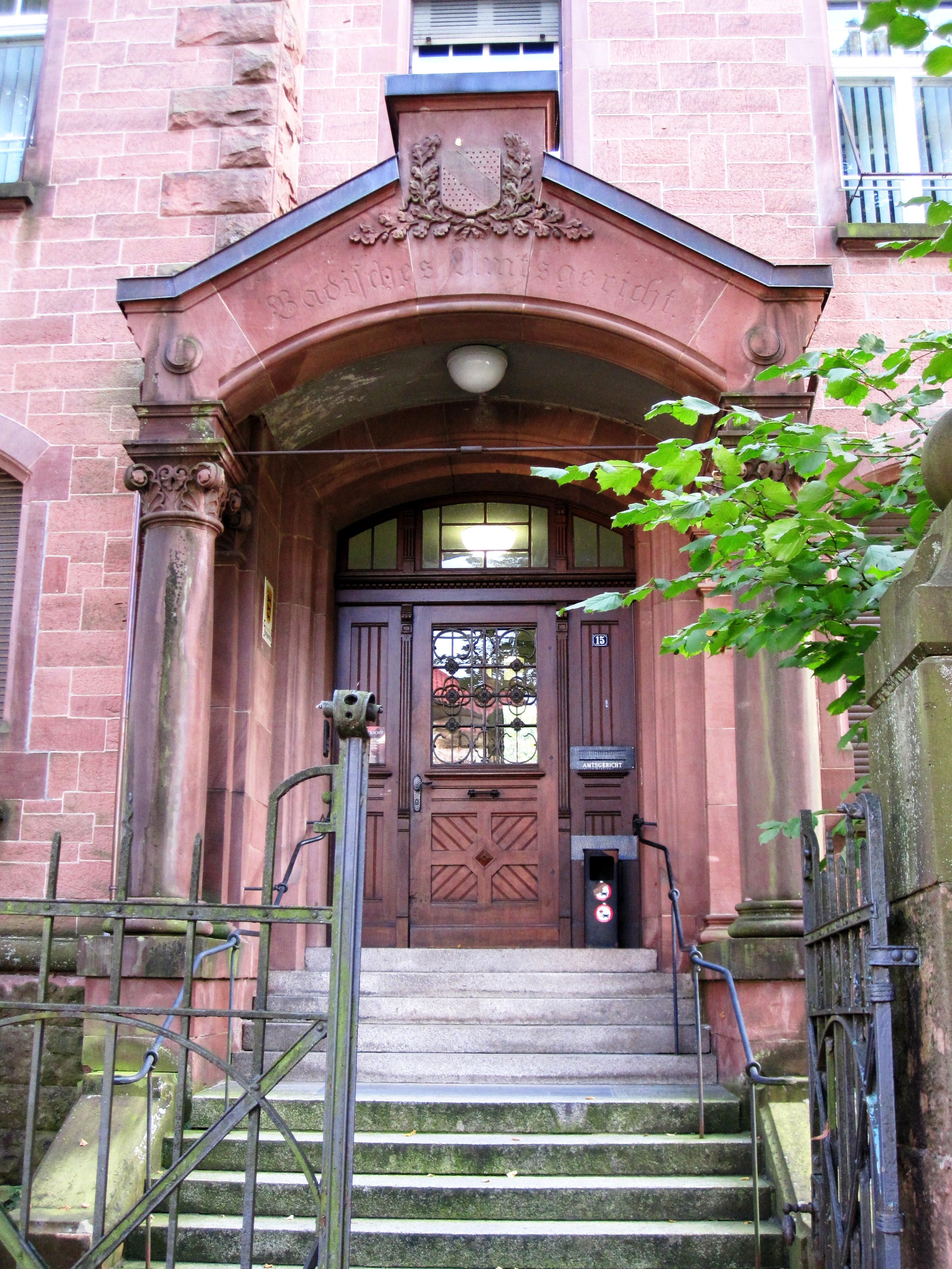 Eingang des Amtsgerichts Waldkirch